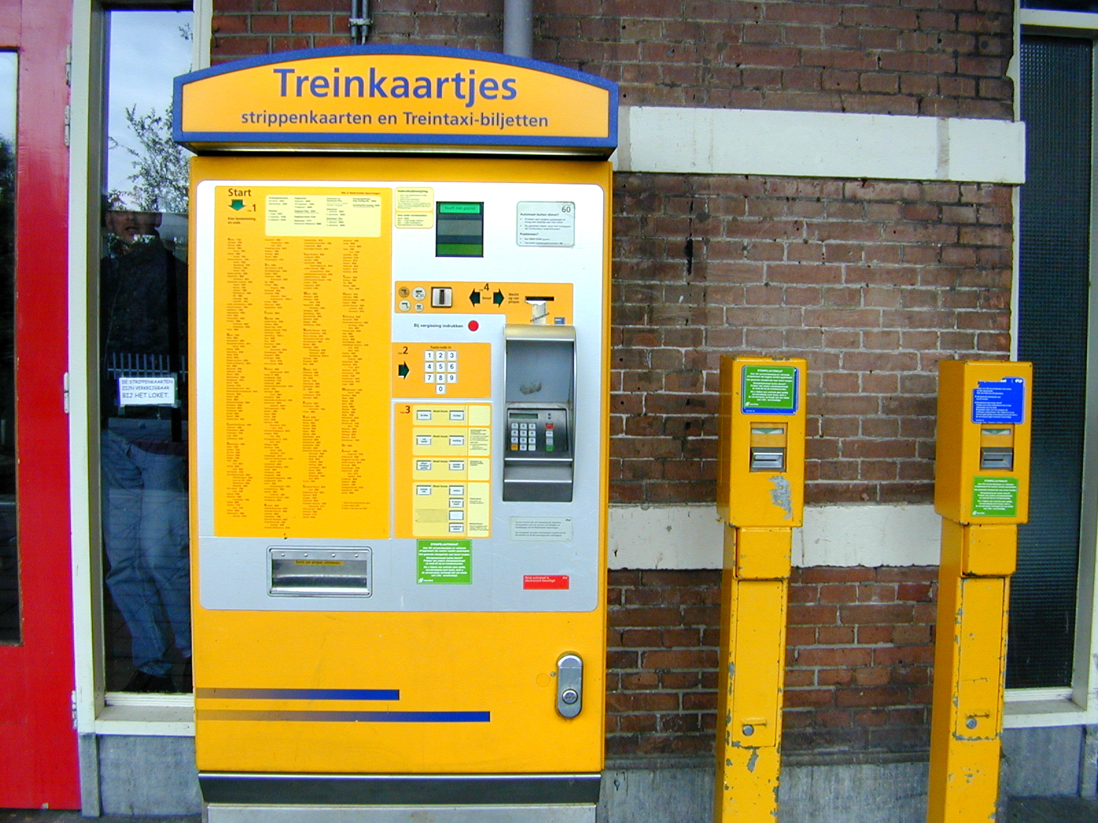 Kaartjes automaat van de Nederlandse Spoorwegen te Sneek. Hierbij zijn de nummers van de stations afgeleid van de lokaale postcodes.